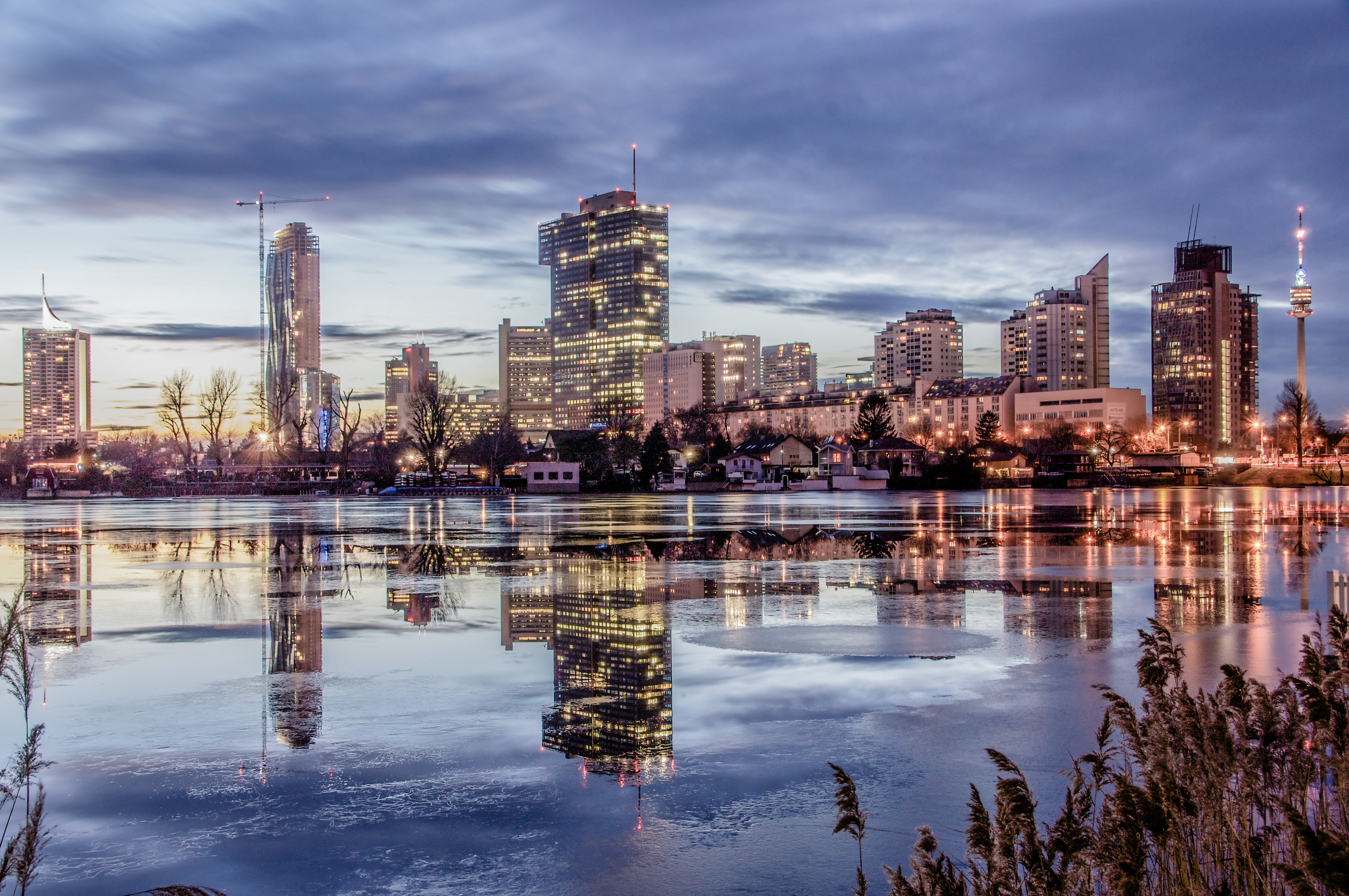 Die Wiener Skyline von der Alten Donau aus gesehen.